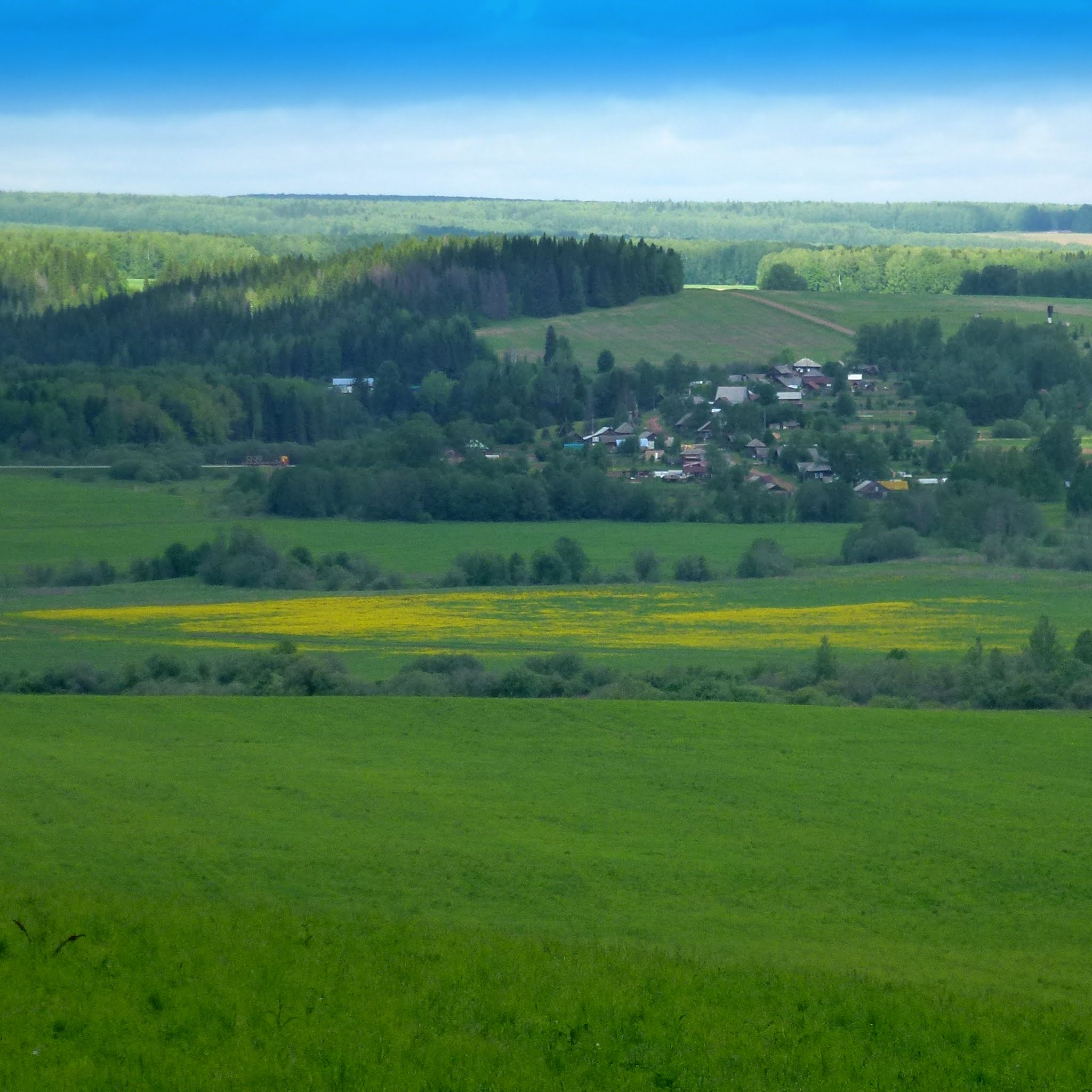 Деревня Числы, Пермский край